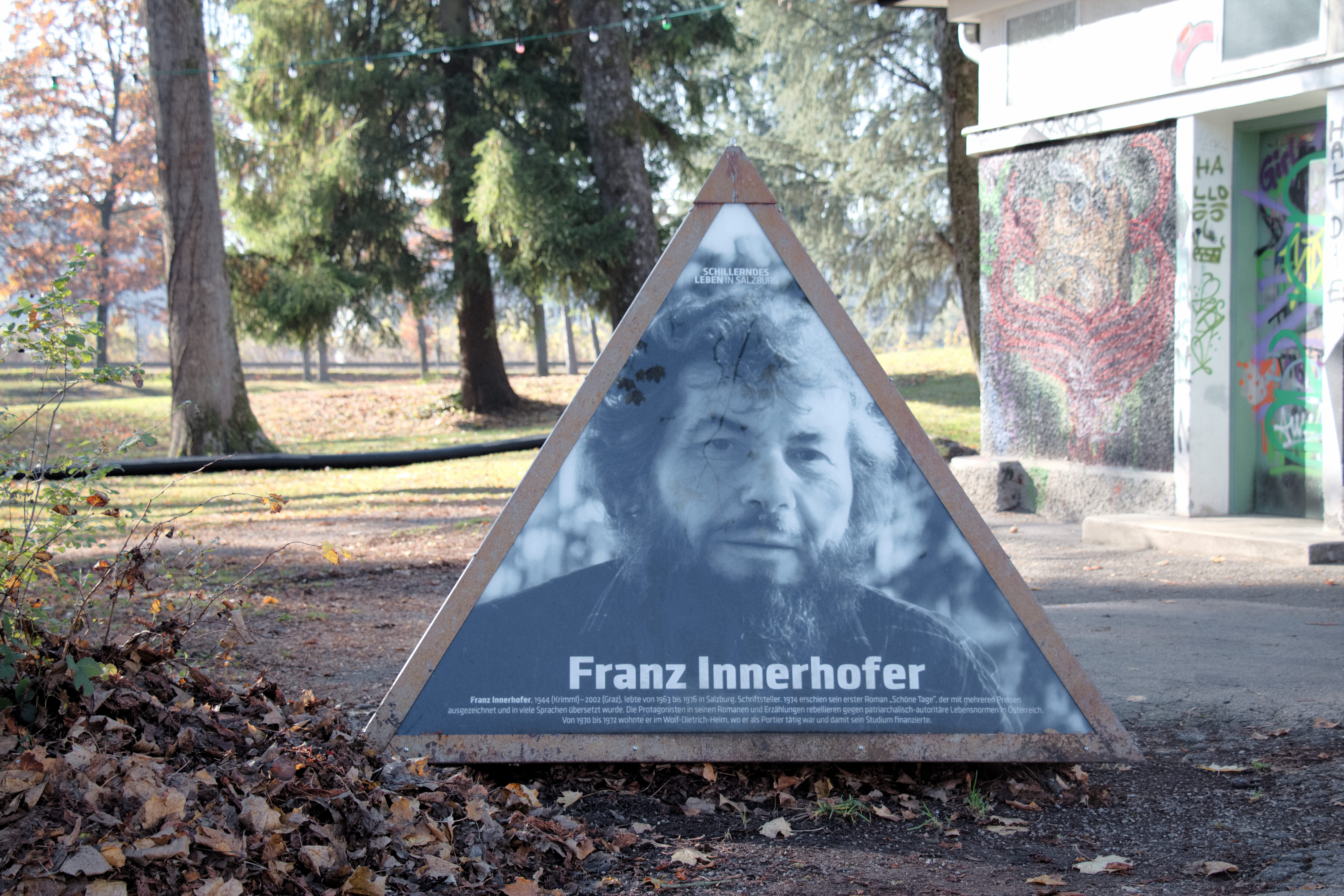 Salzburg, Stadtteil Parsch: Hundertwasser-Alle im Volksgarten - Tafel für den Salzburger Schriftsteller Franz Innerhofer aus der 2016 aufgestellten Reihe Schillerndes Leben in Salzburg. (Einige der Tafeln wurden 2017 von ihrem ursprünglichen Standort entfernt und in die Hundertwasser-Allee gestellt.)